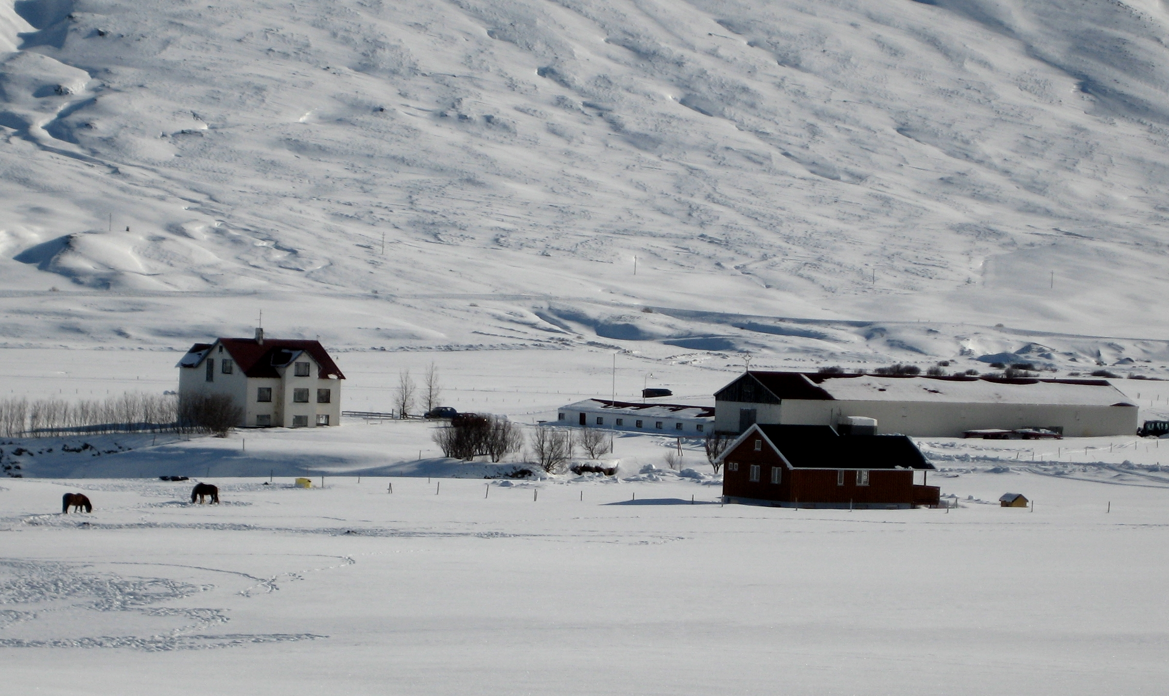 Bakki í Svarfaðardal ásamt útihúsum